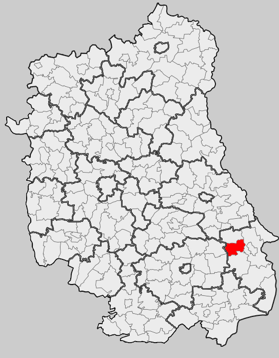 Map of gmina Trzeszczany, Hrubieszów county, Lublin voivodship Mapa gminy Trzeszczany, powiat hrubieszowski, województwo lubelskie